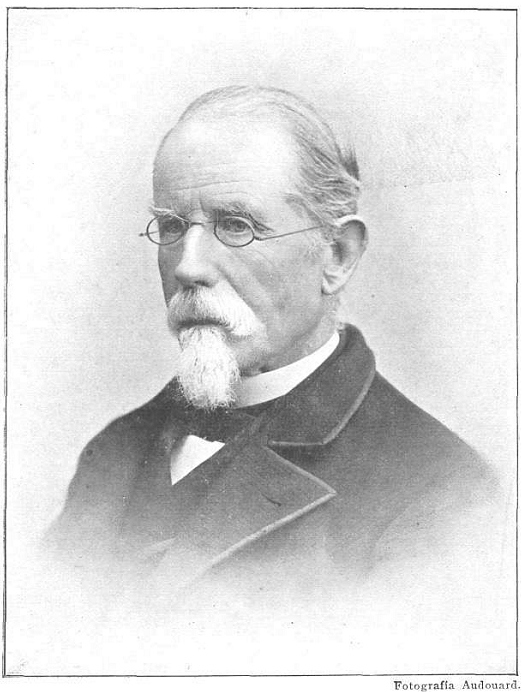 Retrato de Joaquim Rubió Ors, fotografía de Audouard recogida en la revista La Ilustració Catalana.